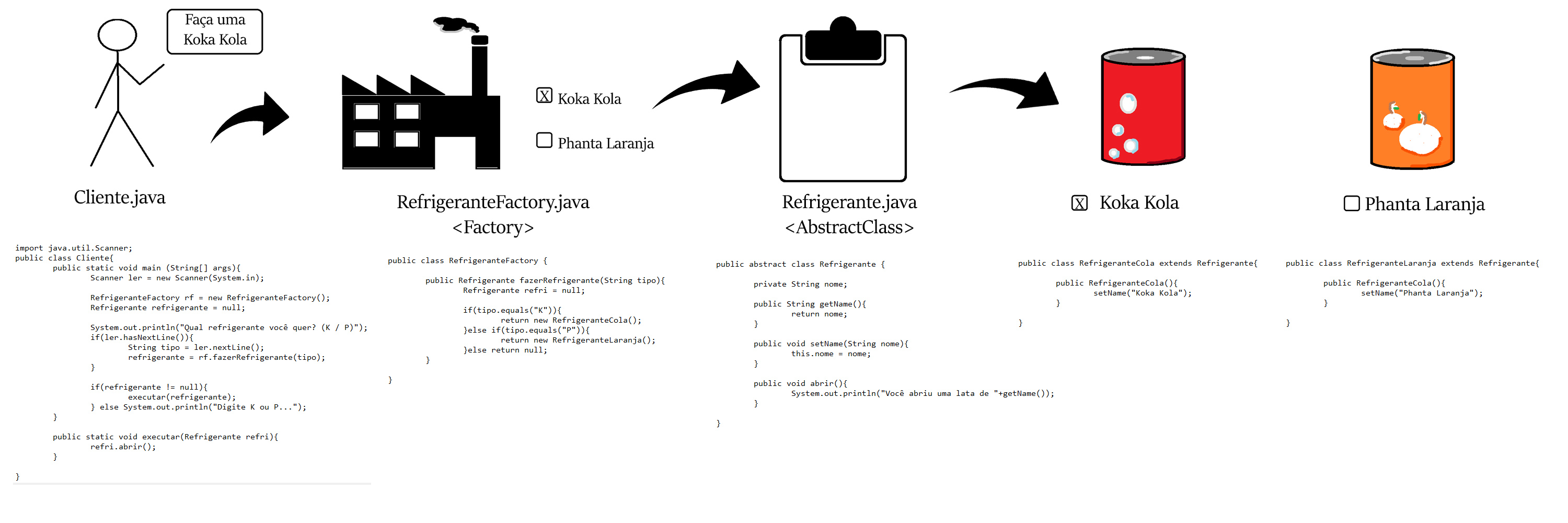 Resumo do padrão GoF Factory Method